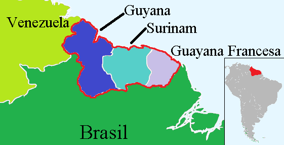 La subdivisión política de América del Sur denominada las Guayanas, situada en su sector septentrional, la cual comprende territorios de tres áreas jurisdiccionales distintas.